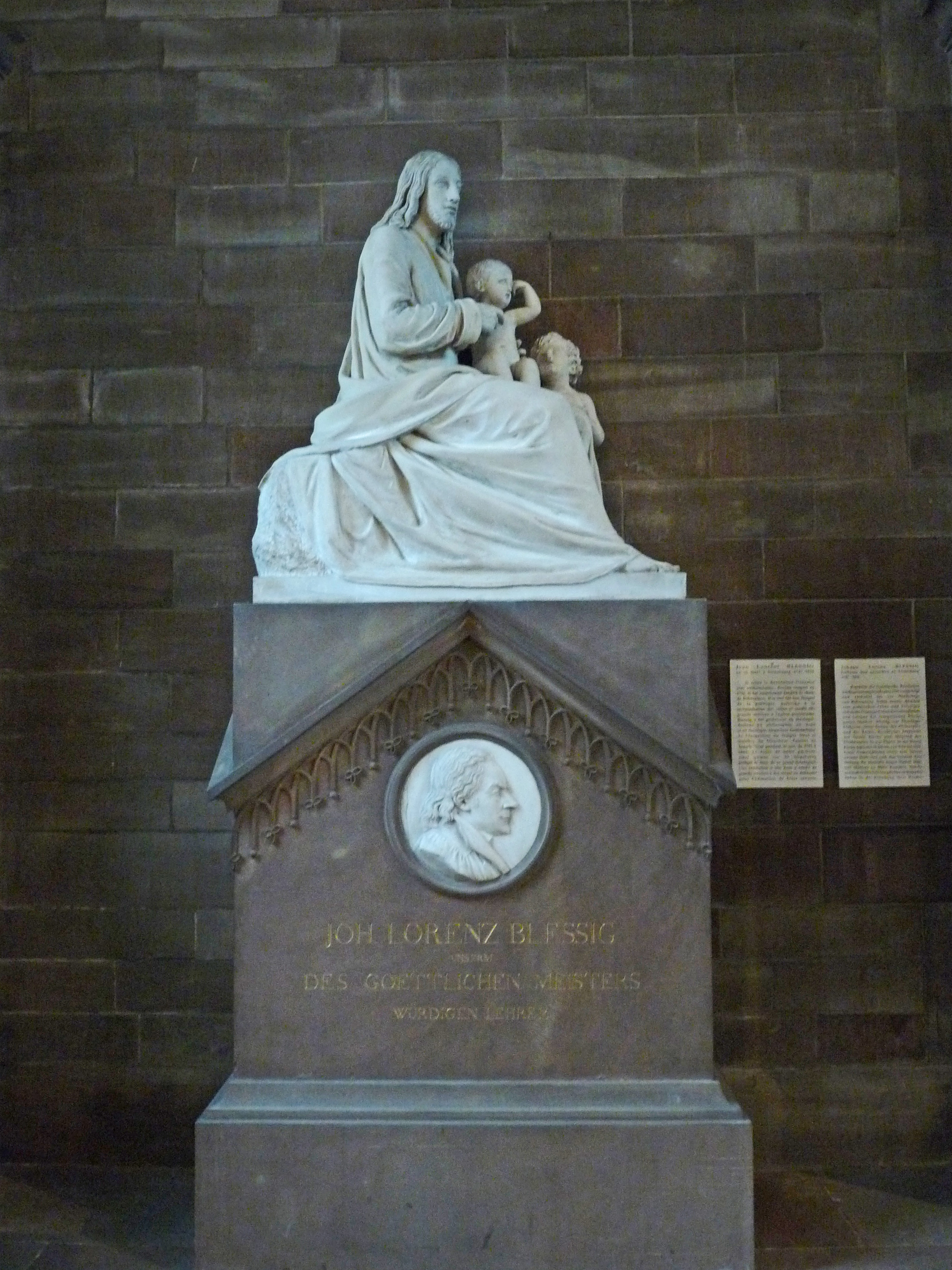 Strasbourg, Temple Neuf : monument à la mémoire de Jean Laurent Blessig (1747-1816), exécuté par Landolin Ohmacht.